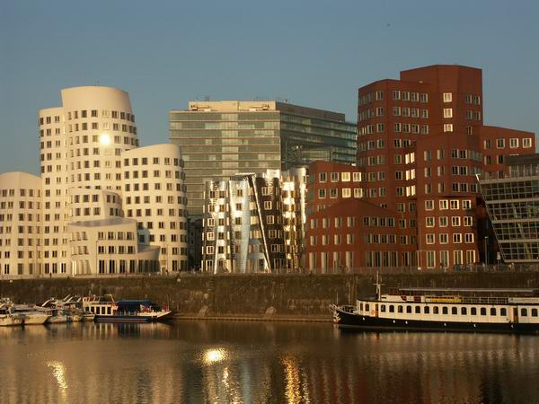 Buildings by Frank Gehry in Düsseldorf